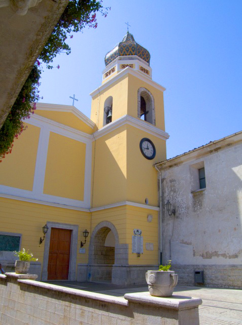 Facciata della chiesa di San Giovanni Battista, San Lupo (BN), Italia.